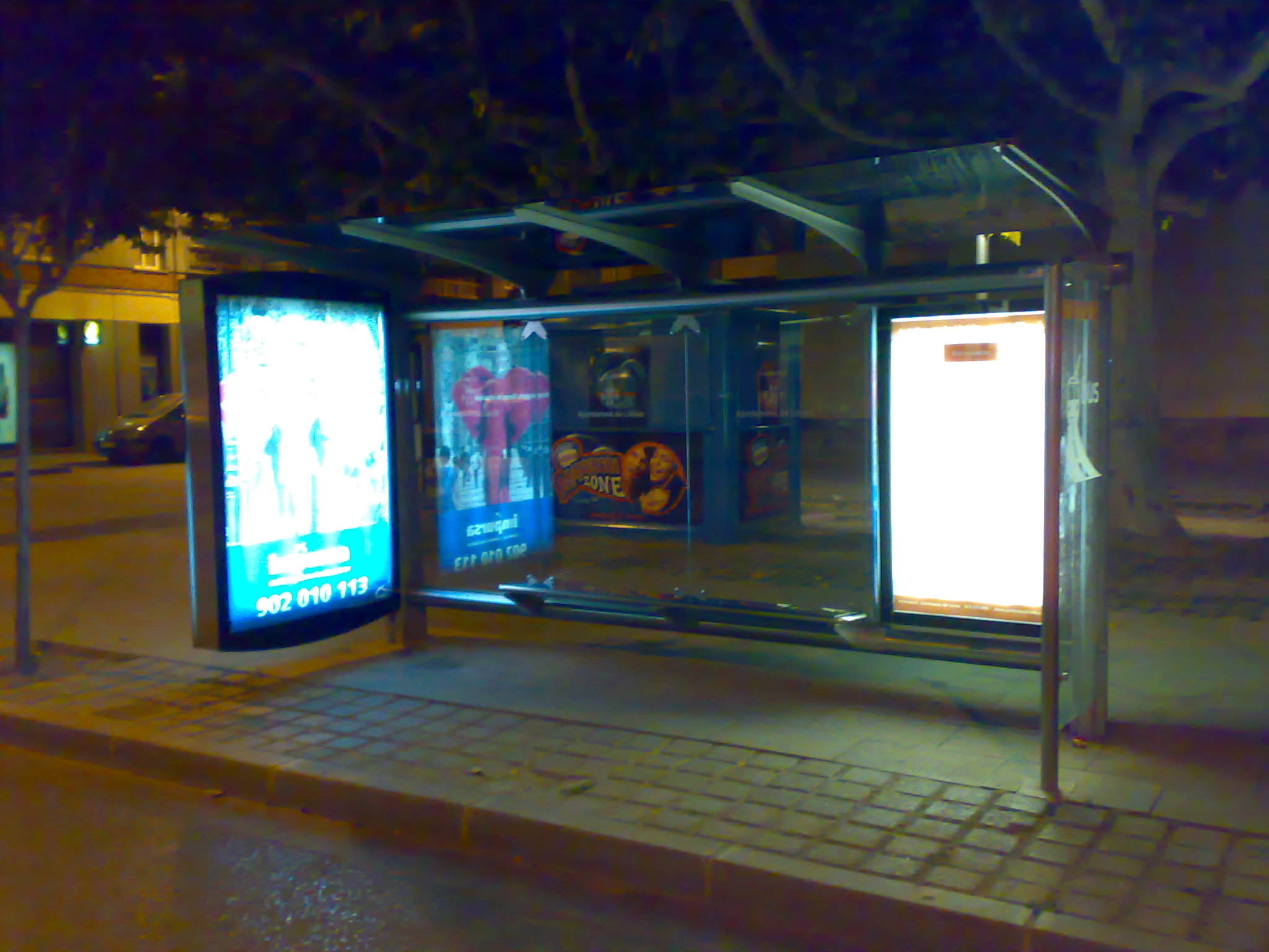 Nocturna Parada iluminada linea autobuses Lérida